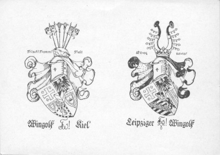 Couleurkarte des Kieler Wingolfs um 1954